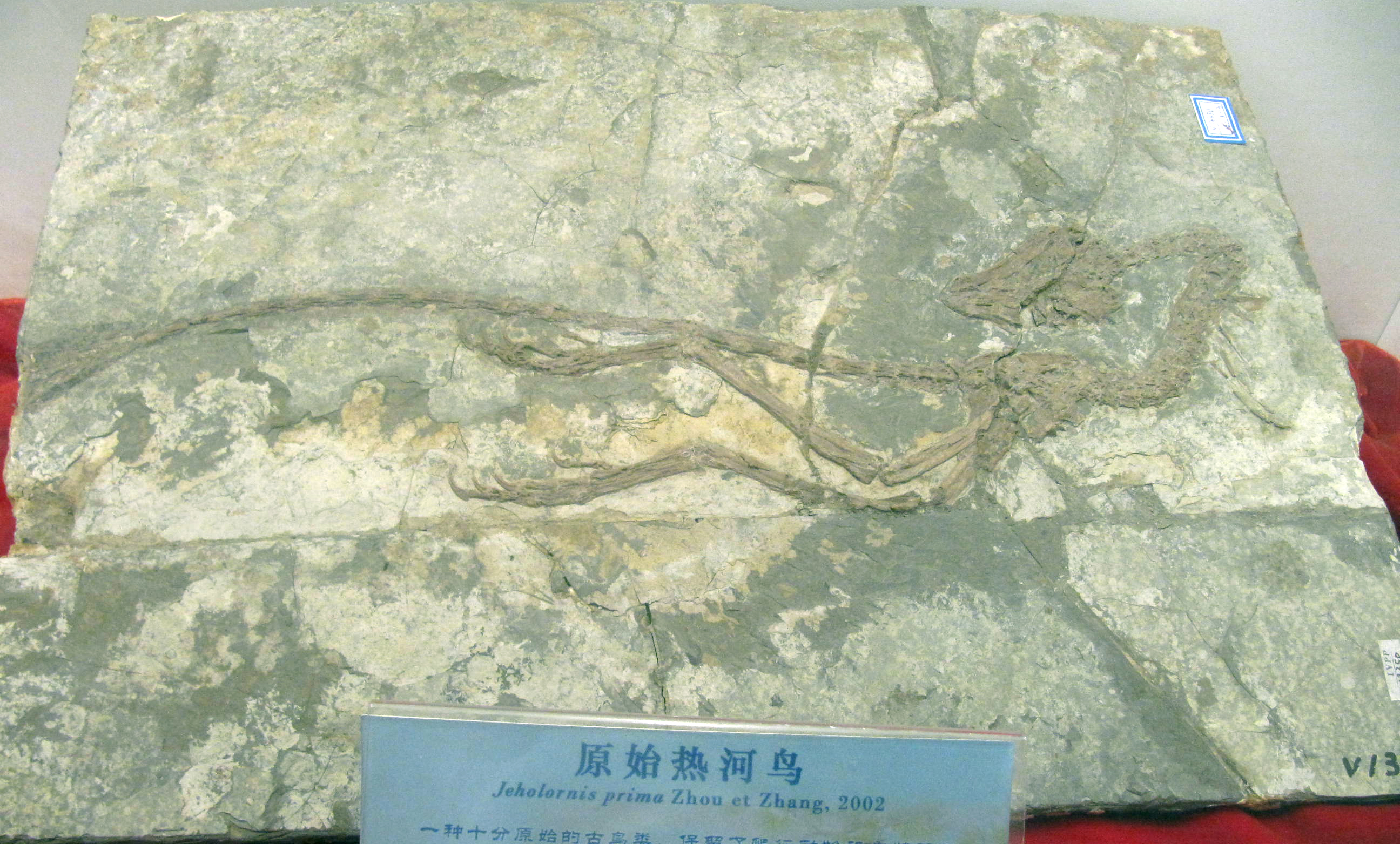 IVPP V13550 Beijing Science Museum